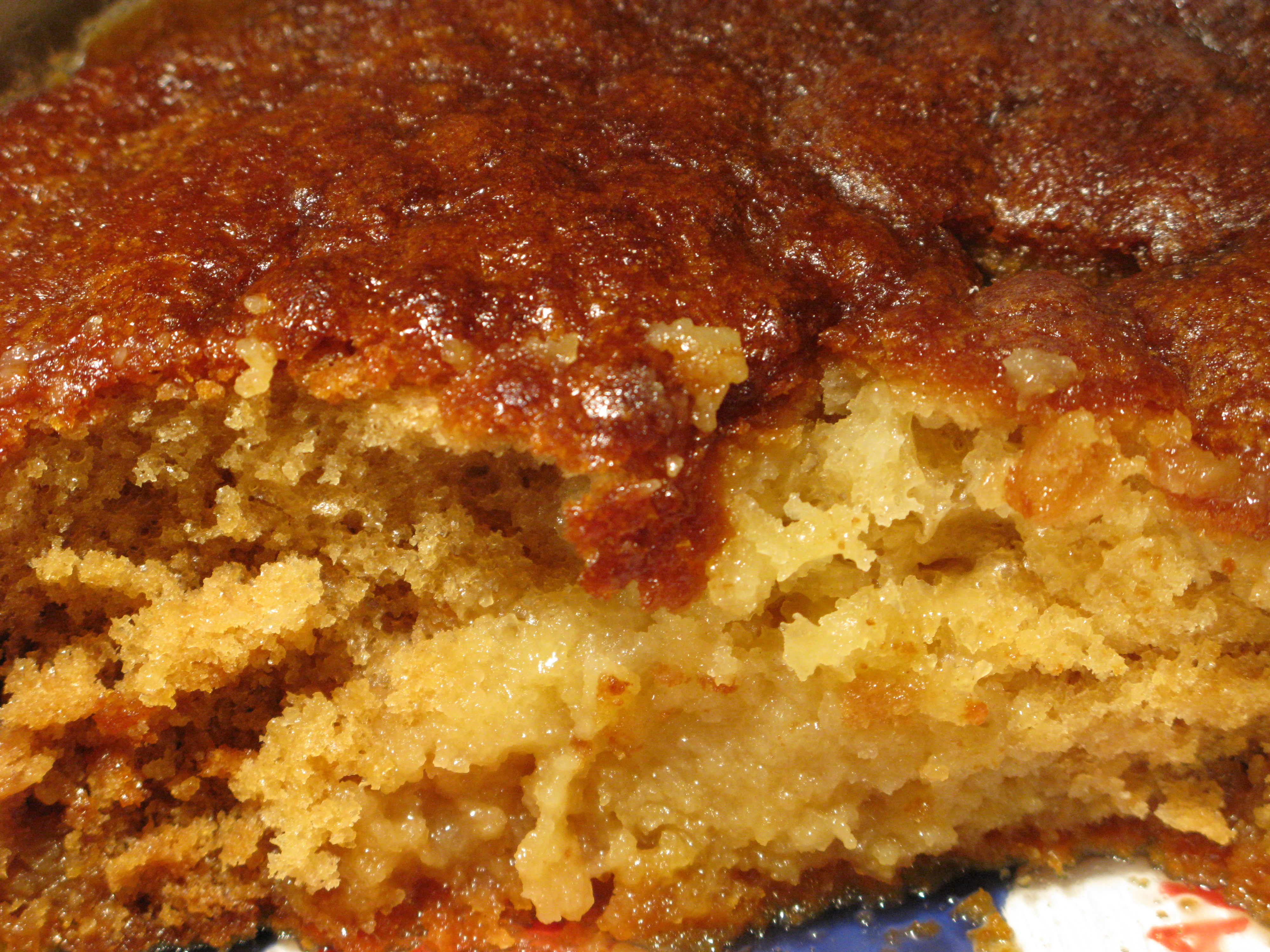 Local cuisine